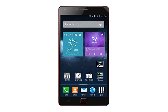 베가 아이언2 블랙